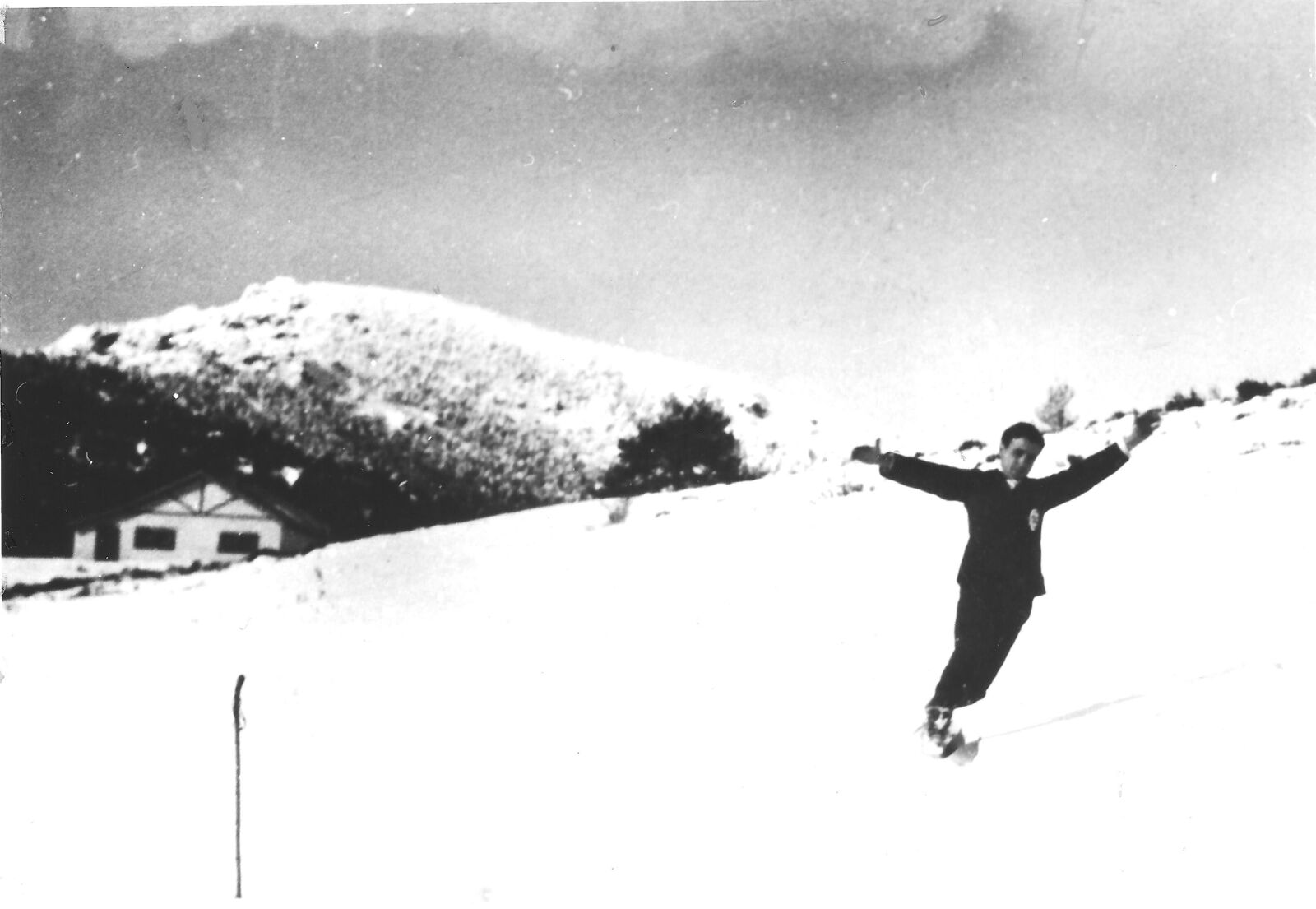 Juan Kindelán Duany practicando la cristiania cerca del Clun Alpino Español.